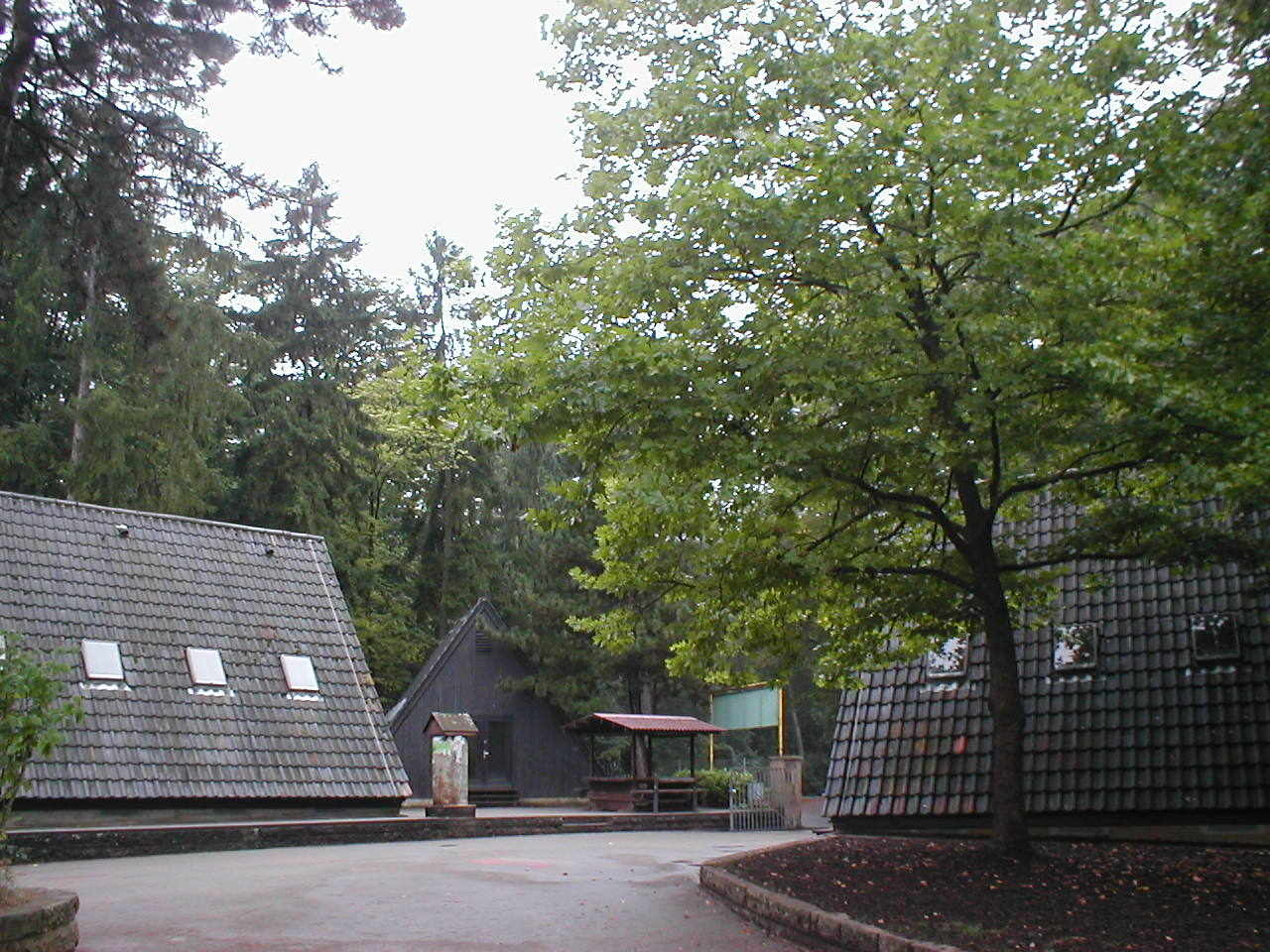 Häusergruppe Ho, Tschi und Minh im Walderholungsheim Gaffenberg bei Heilbronn